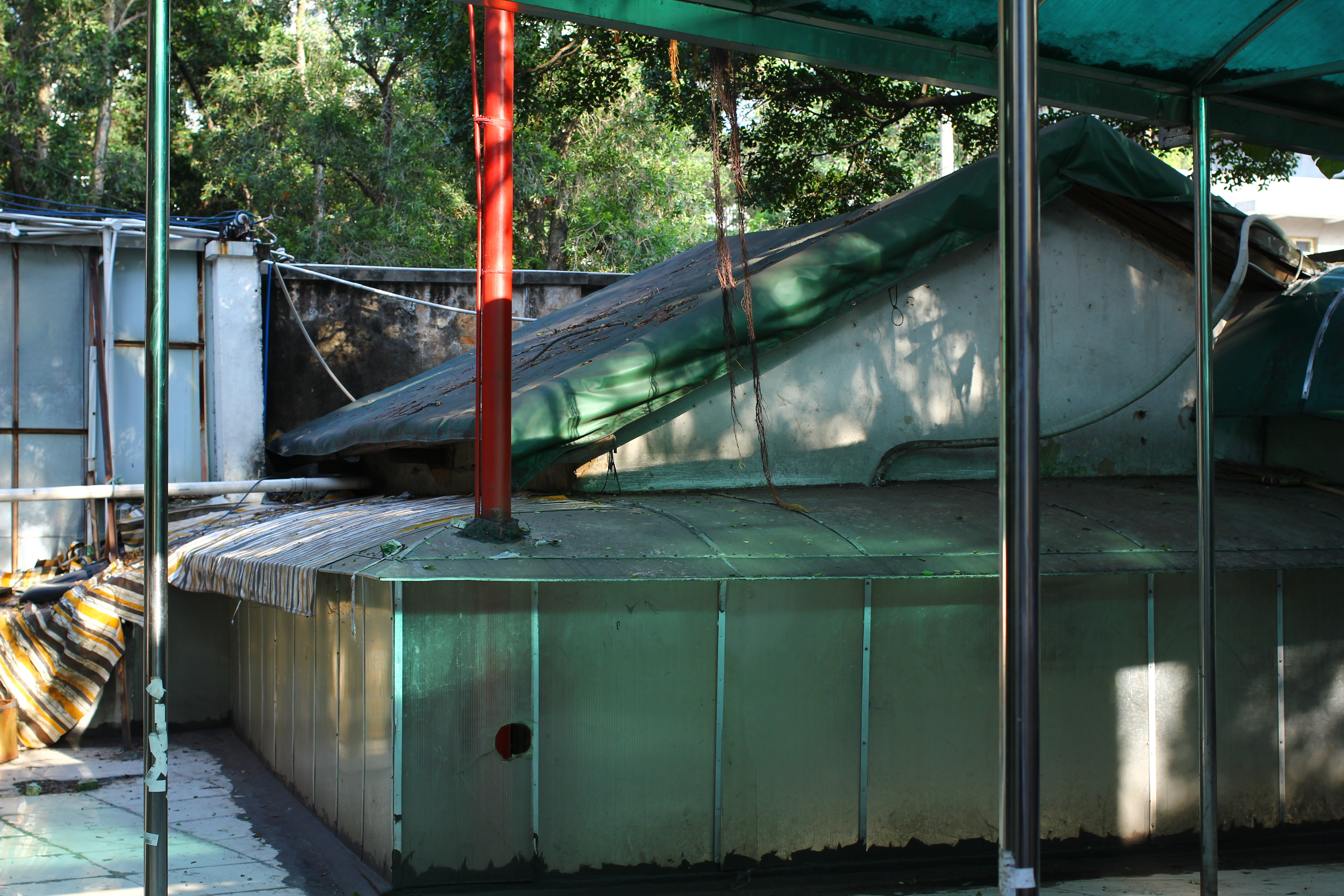 新一軍征緬陣亡將士公墓左門頂部。